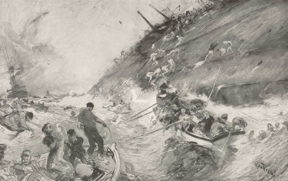 Sketch